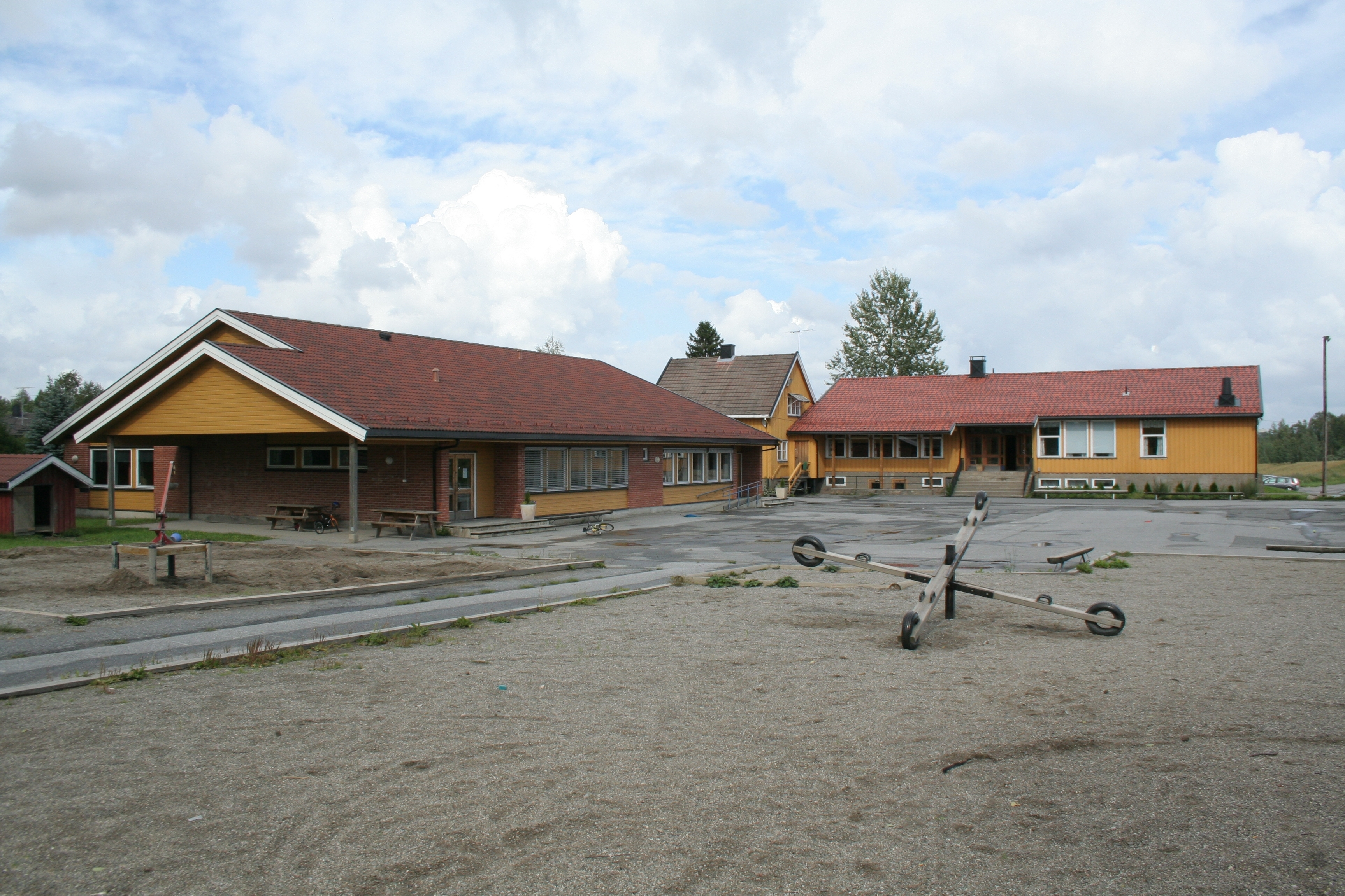 Kirkeng skole